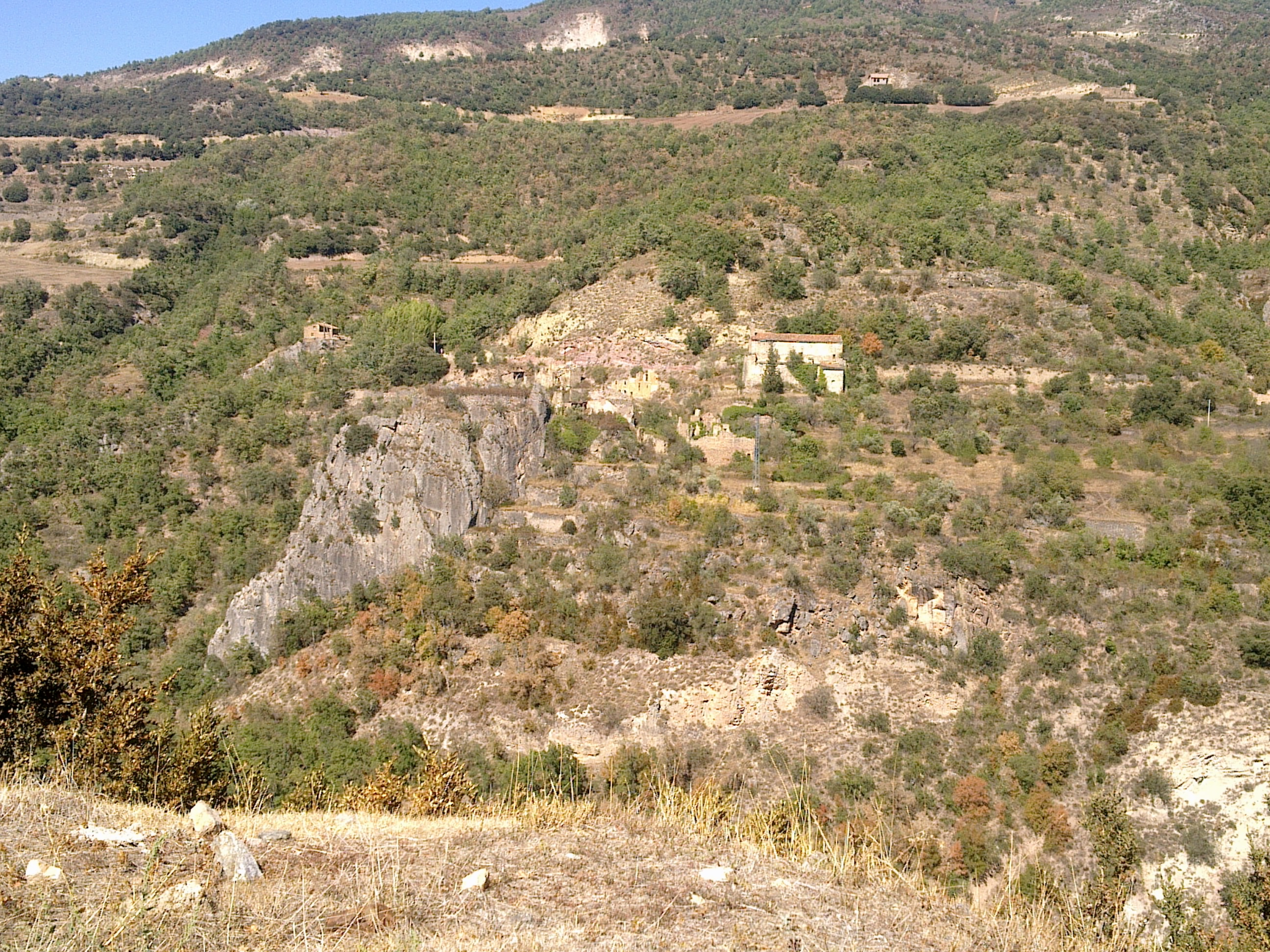 Castell de Tost